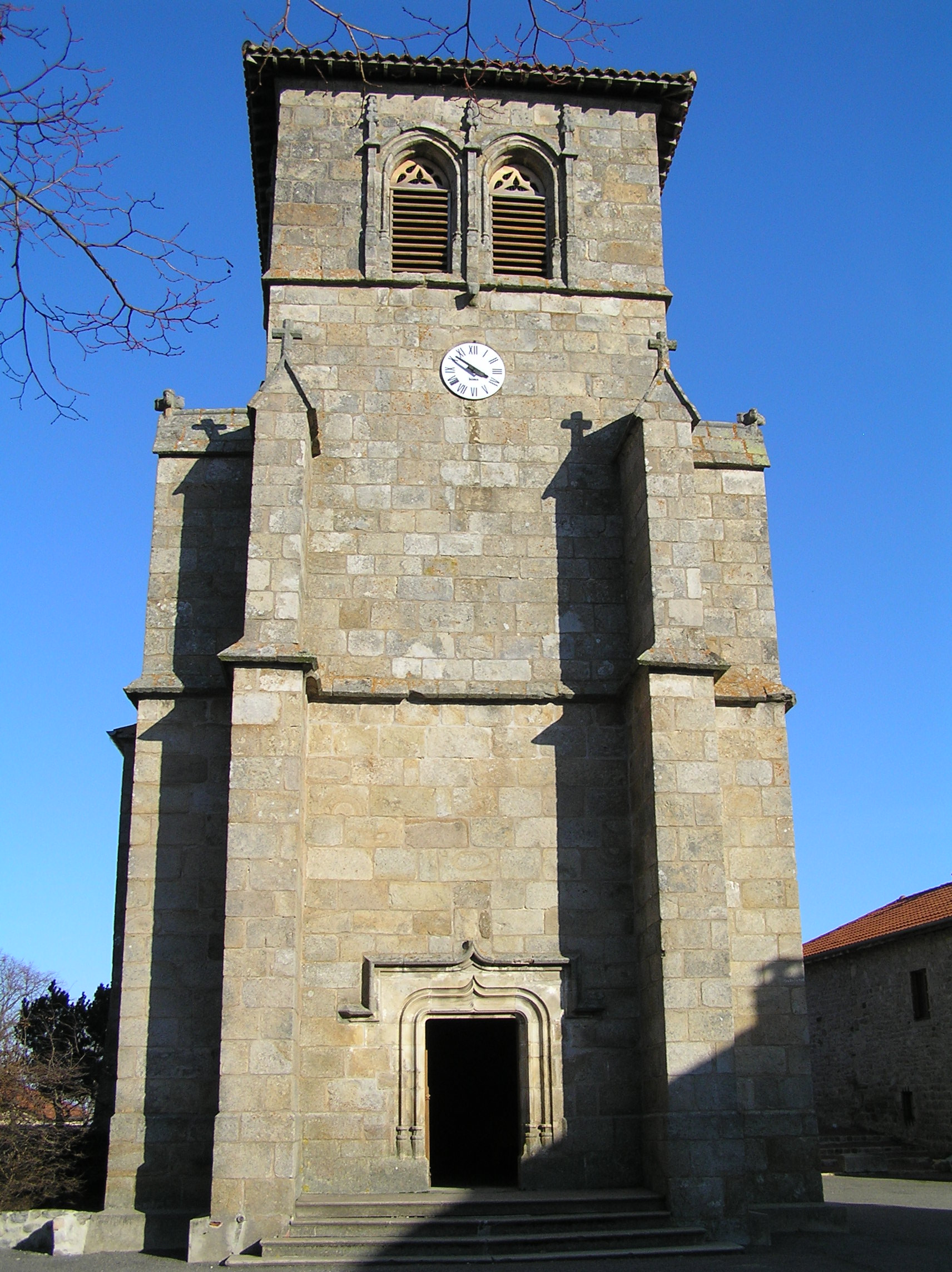 Eglise de Lérigneux, Loire, France